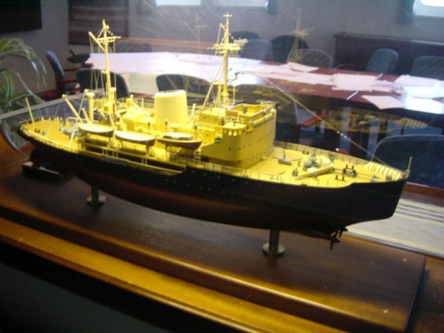 Model of Icebreaker Oden (I)